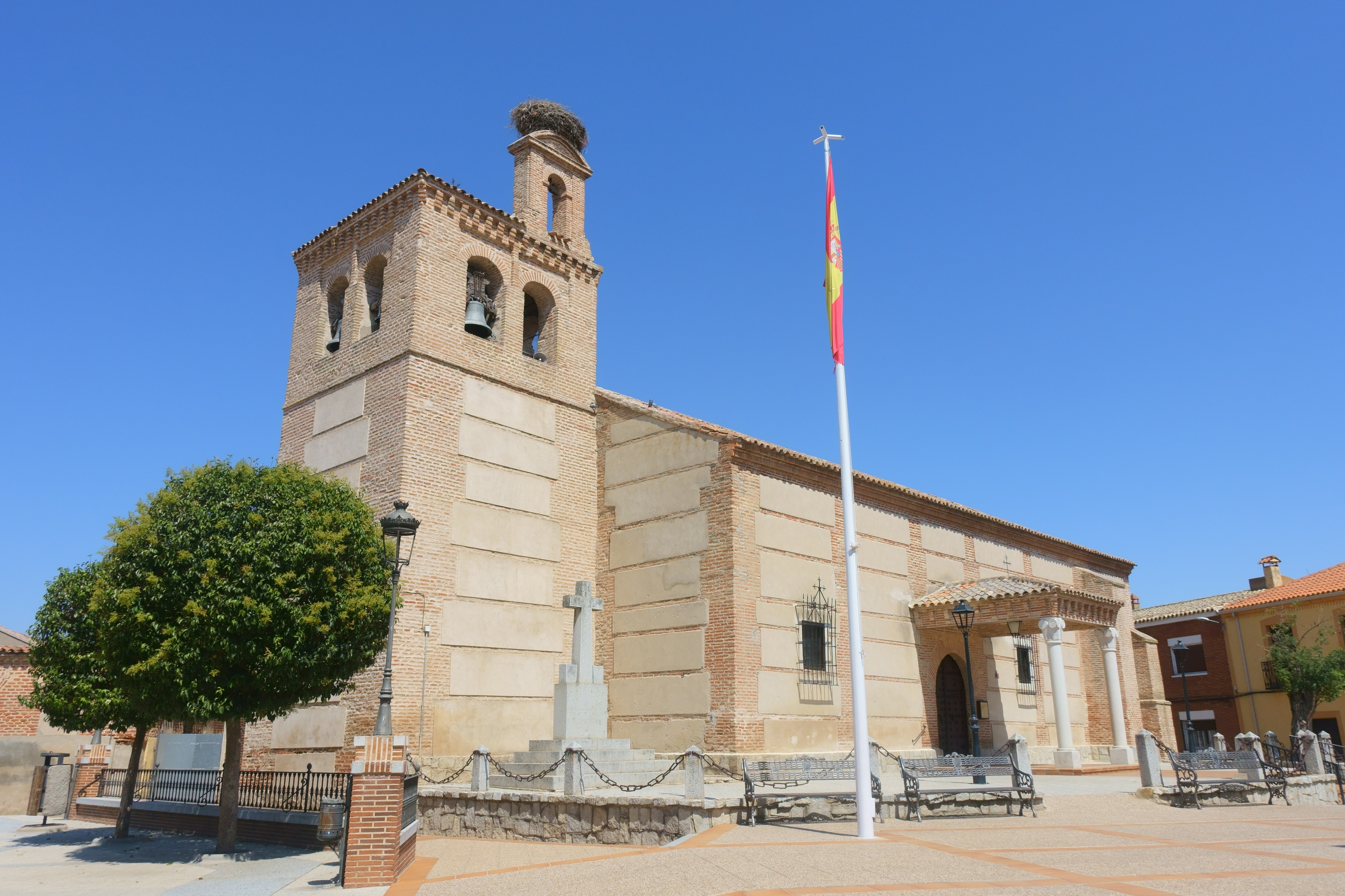 Iglesia de la Inmaculada Concepción, Domingo Pérez (Toledo, España).